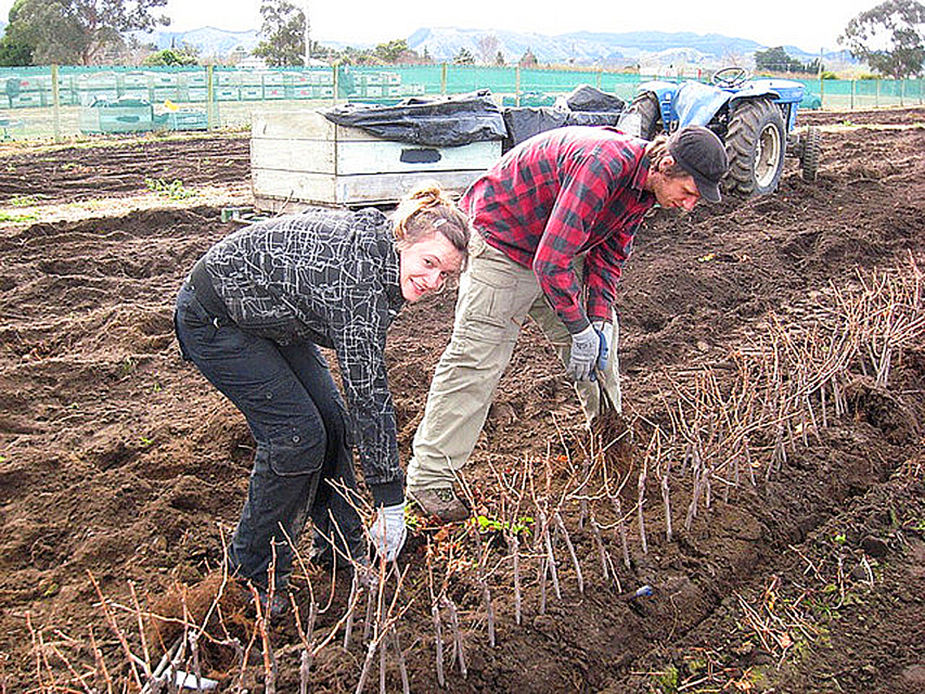 Pépinéristes viticoles aux USA le 11 juillet 2008